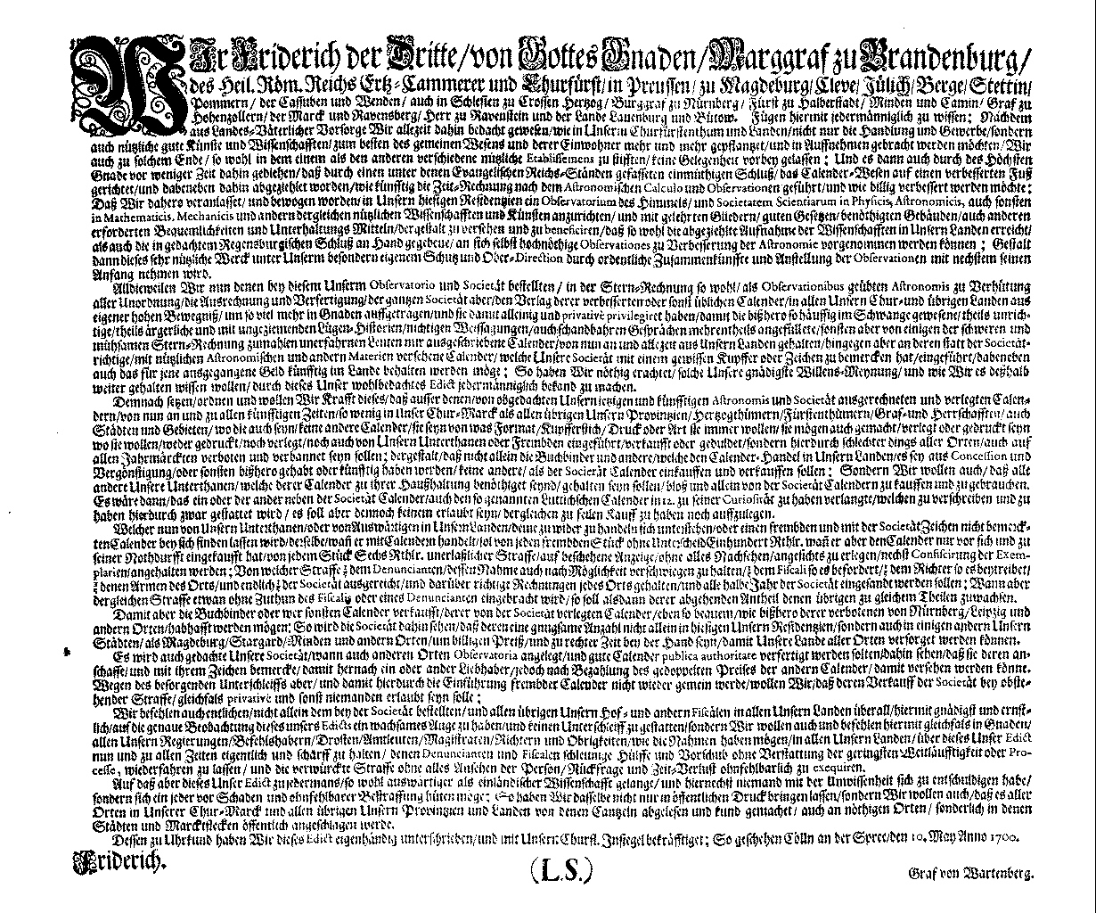 Das Kalenderpatent vom 10. Mai 1700, die "Gründungsurkunde" des Astronomischen Rechen-Instituts.